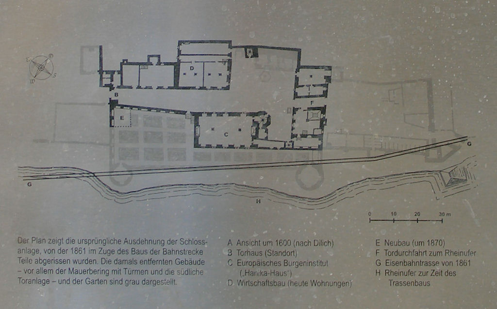 Plan des Schloss Philippsburg in Braubach